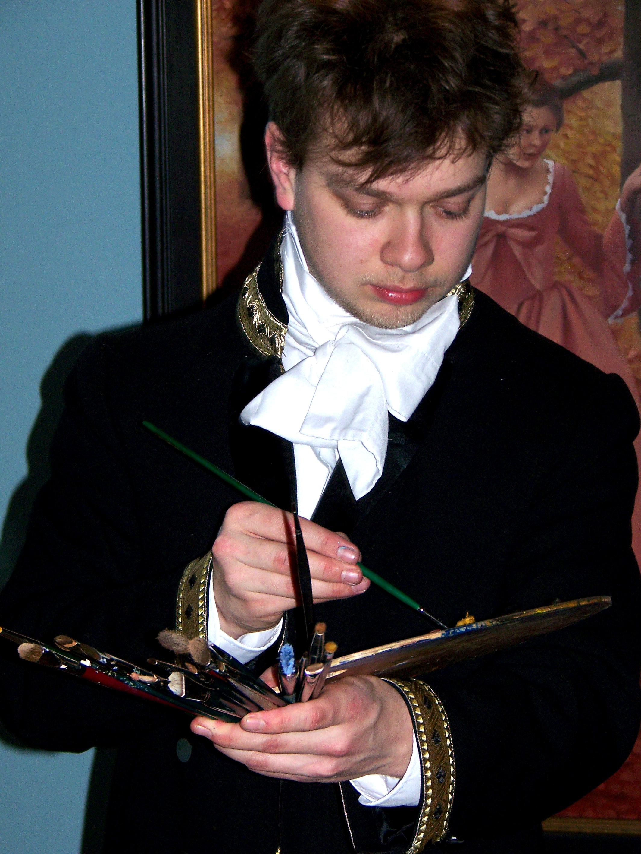 Daniel Douglas aan het werk in het Drents Museum